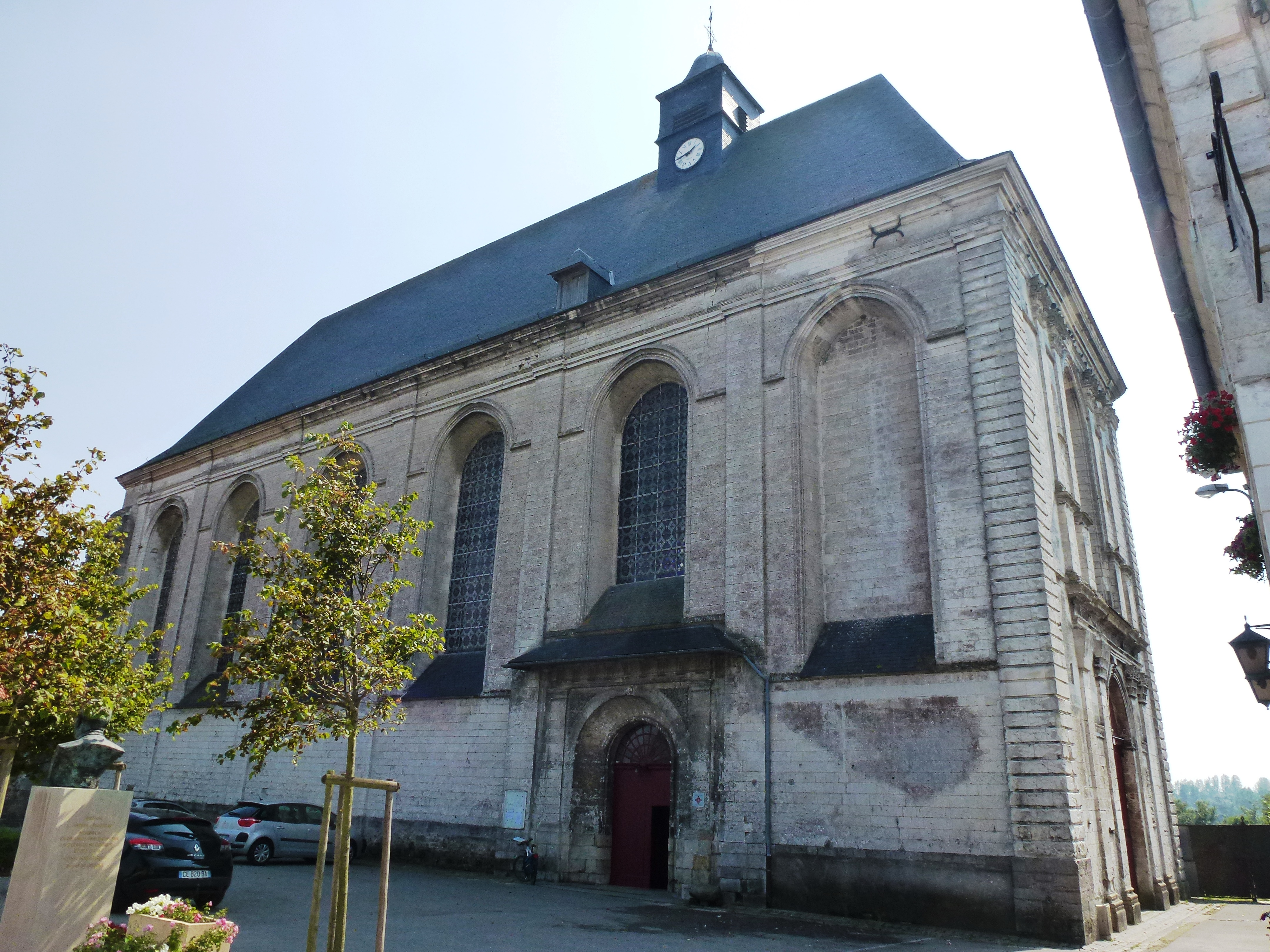 Abbaye des Prémontrés de Licques (ClasséInscrit) .